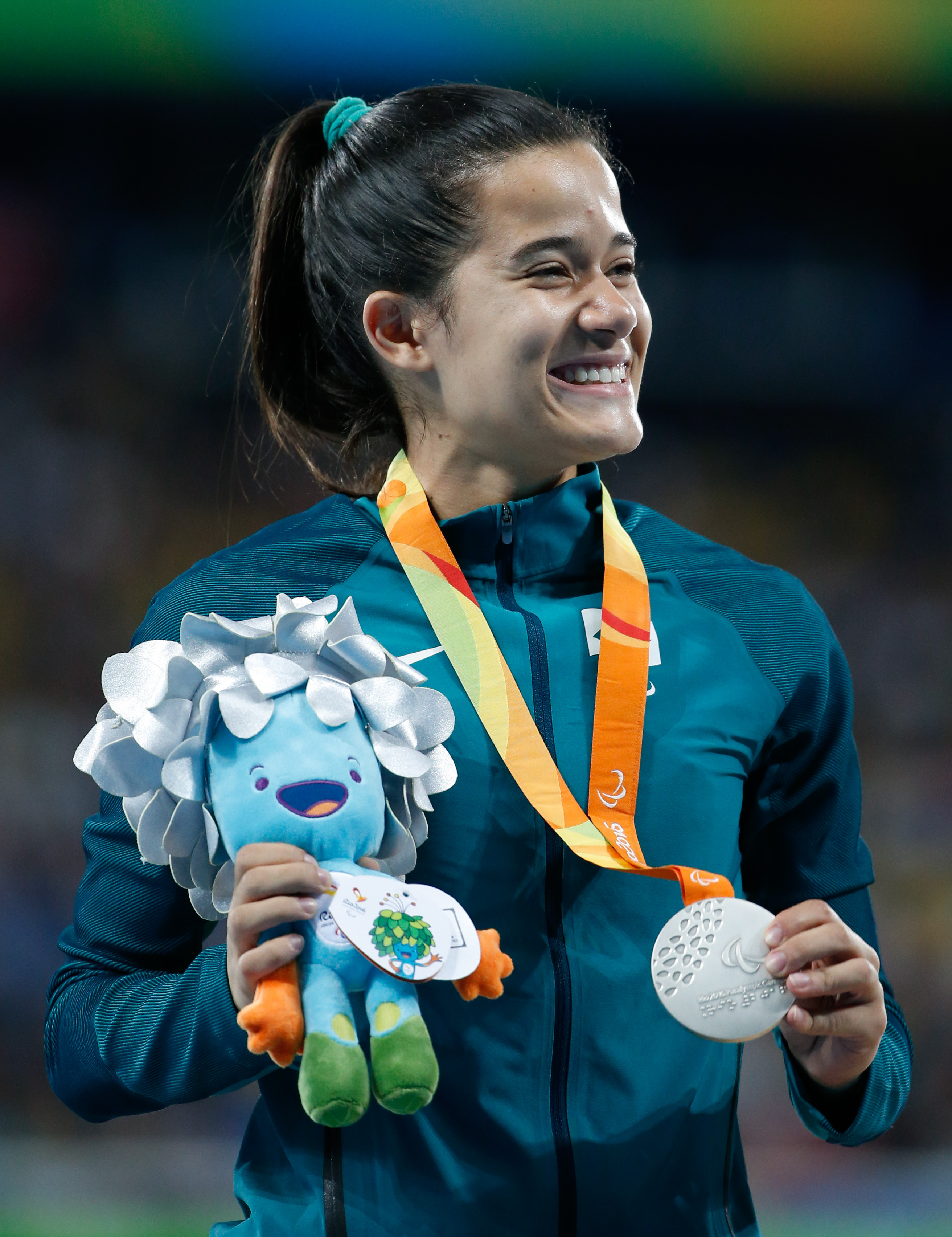 Rio de Janeiro - Brasileira Veronica Hipolito leva medalha de prata nos 100m T38 nos Jogos Paralímpicos Rio 2016, no Estádio